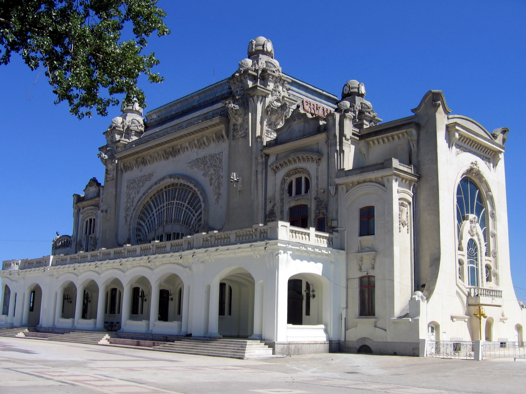 Canteen in Constanţa (Romania)